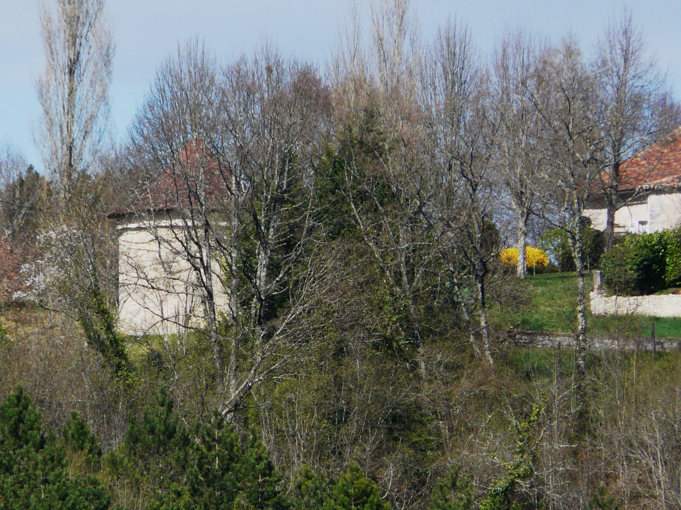 Le pigeonnier du château du Puy-Saint-Astier, Saint-Astier, Dordogne, France